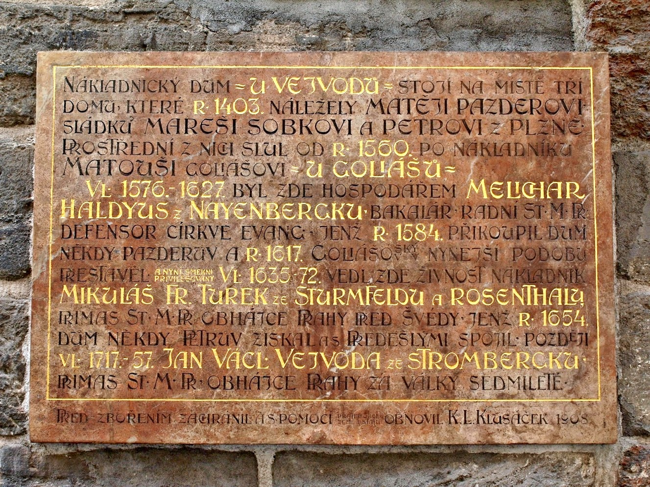 dům u Vejvodů